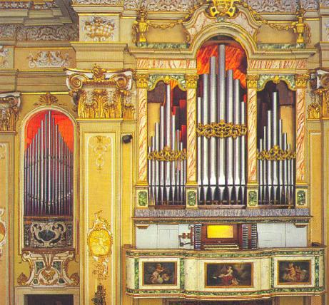 Organo Locatelli collocato in una superba cassa lignea.